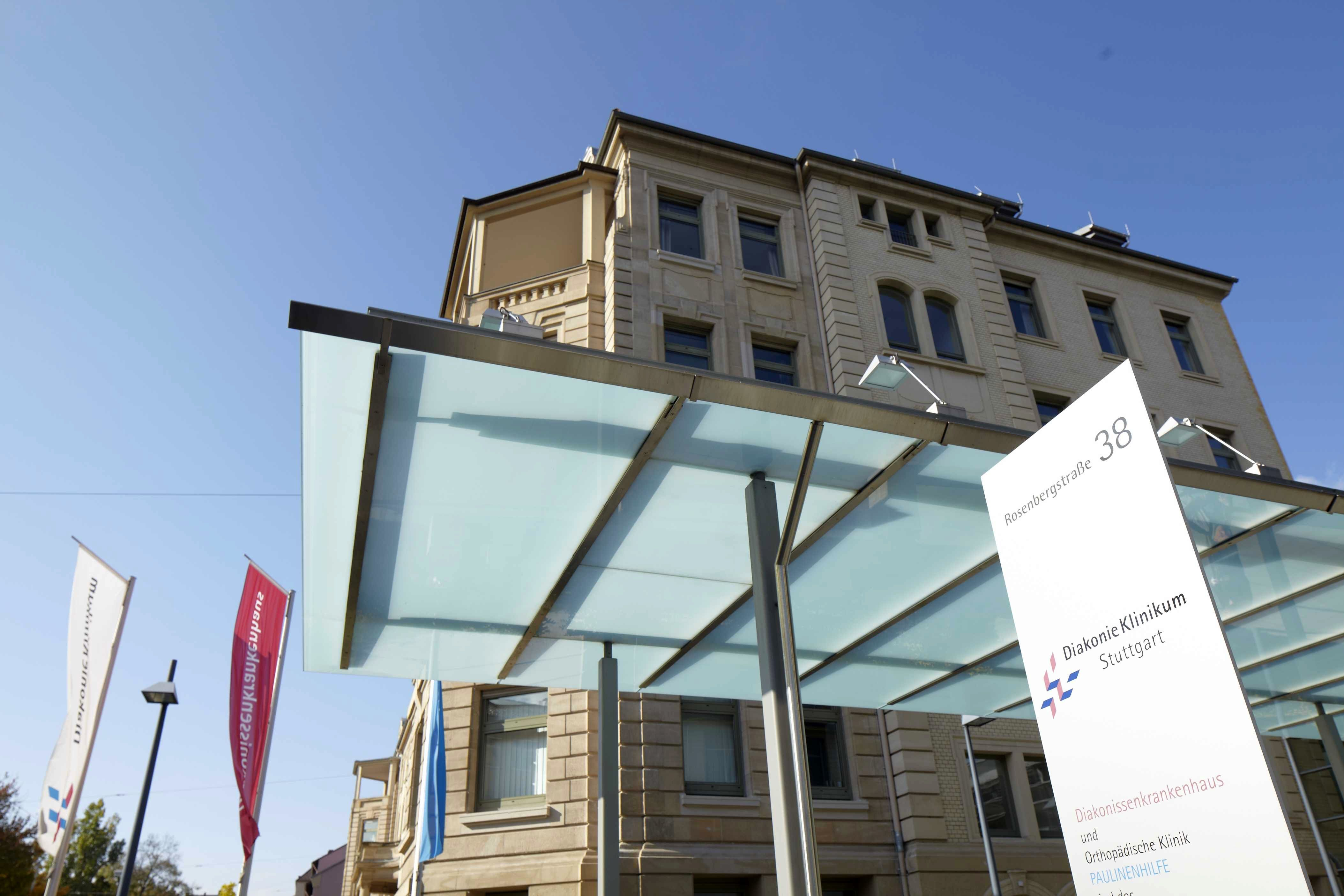 Diakonie-Klinikum Stuttgart, Außenaufnahme